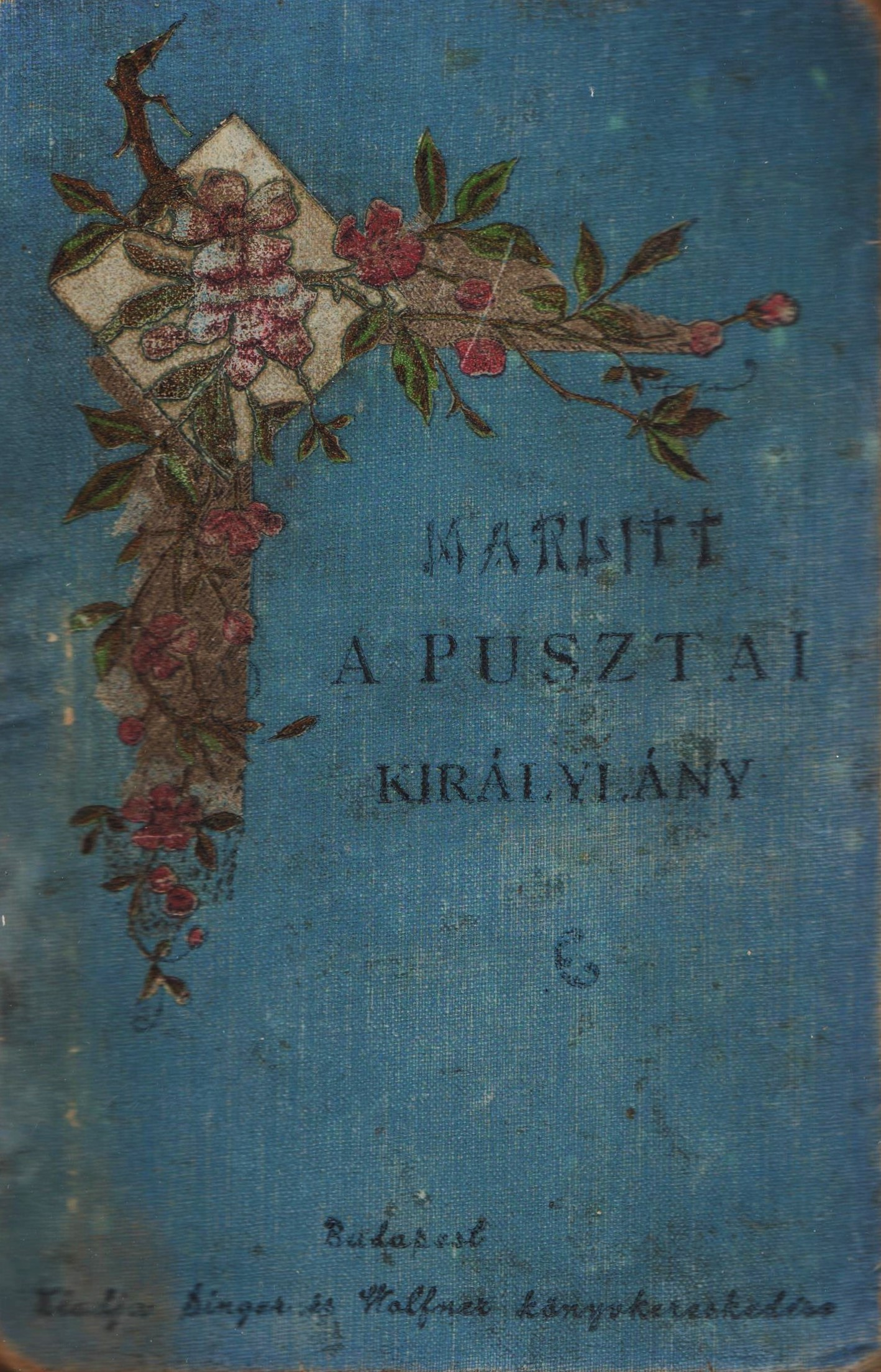 E. Marlitt: A pusztai királylány, 1890-es évek